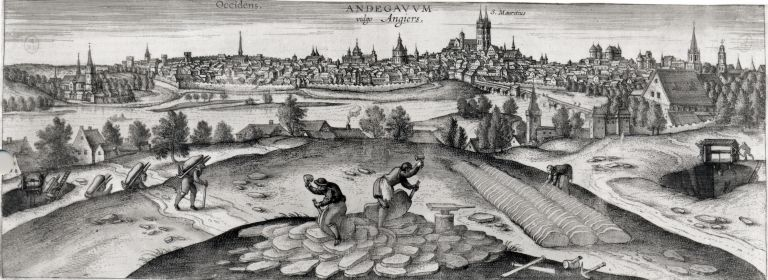 Andegavum vulgo Angiers, 1561: vue d'ensemble de la rive gauche d'Angers depuis le secteur des Capucins sur la rive droite où sont occupés des fendeurs d'ardoise, Gravure coloriée, d'après dessin, par Hougfnaglius, 1561.